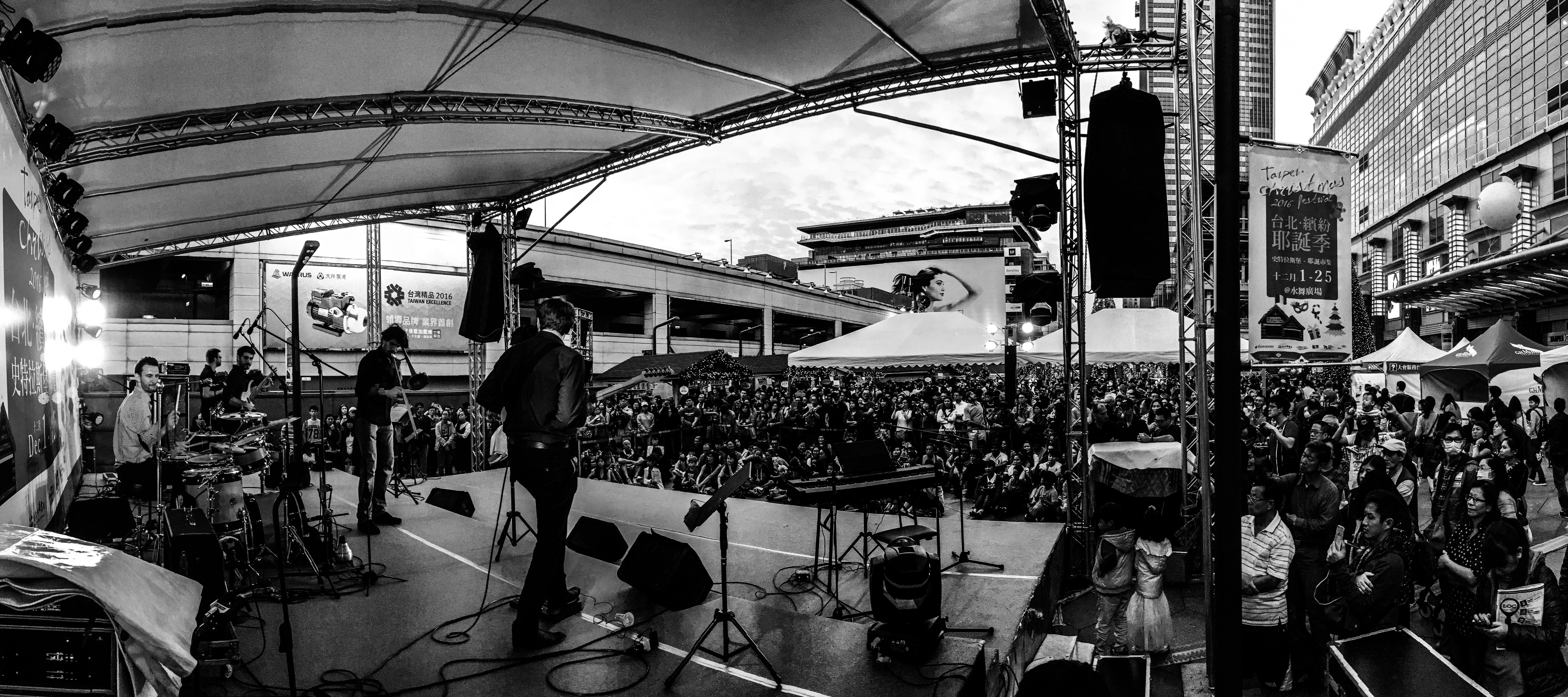 OZMA Live à Taipei en 2016